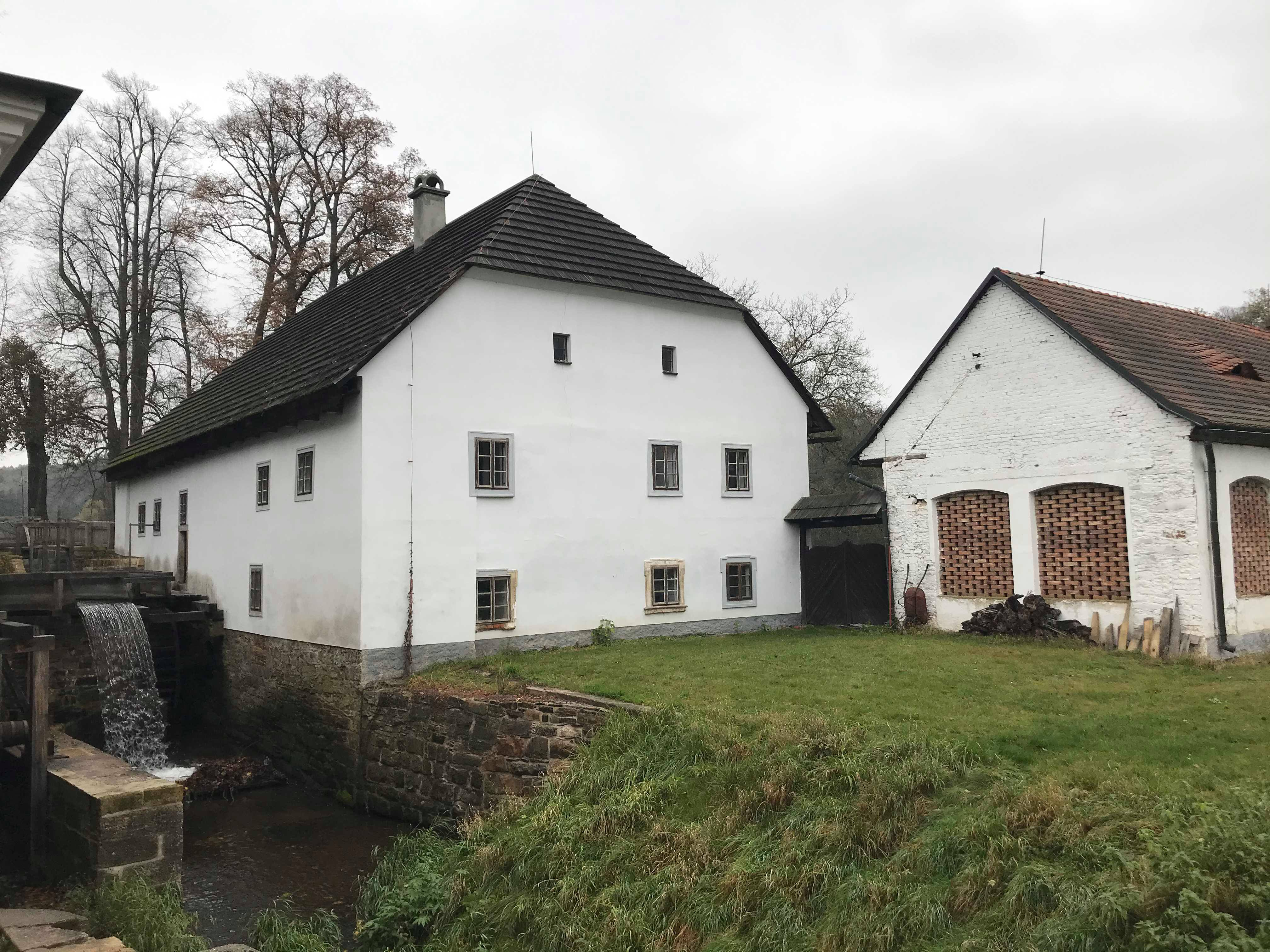 NPP Babiččino údolí, mlýn